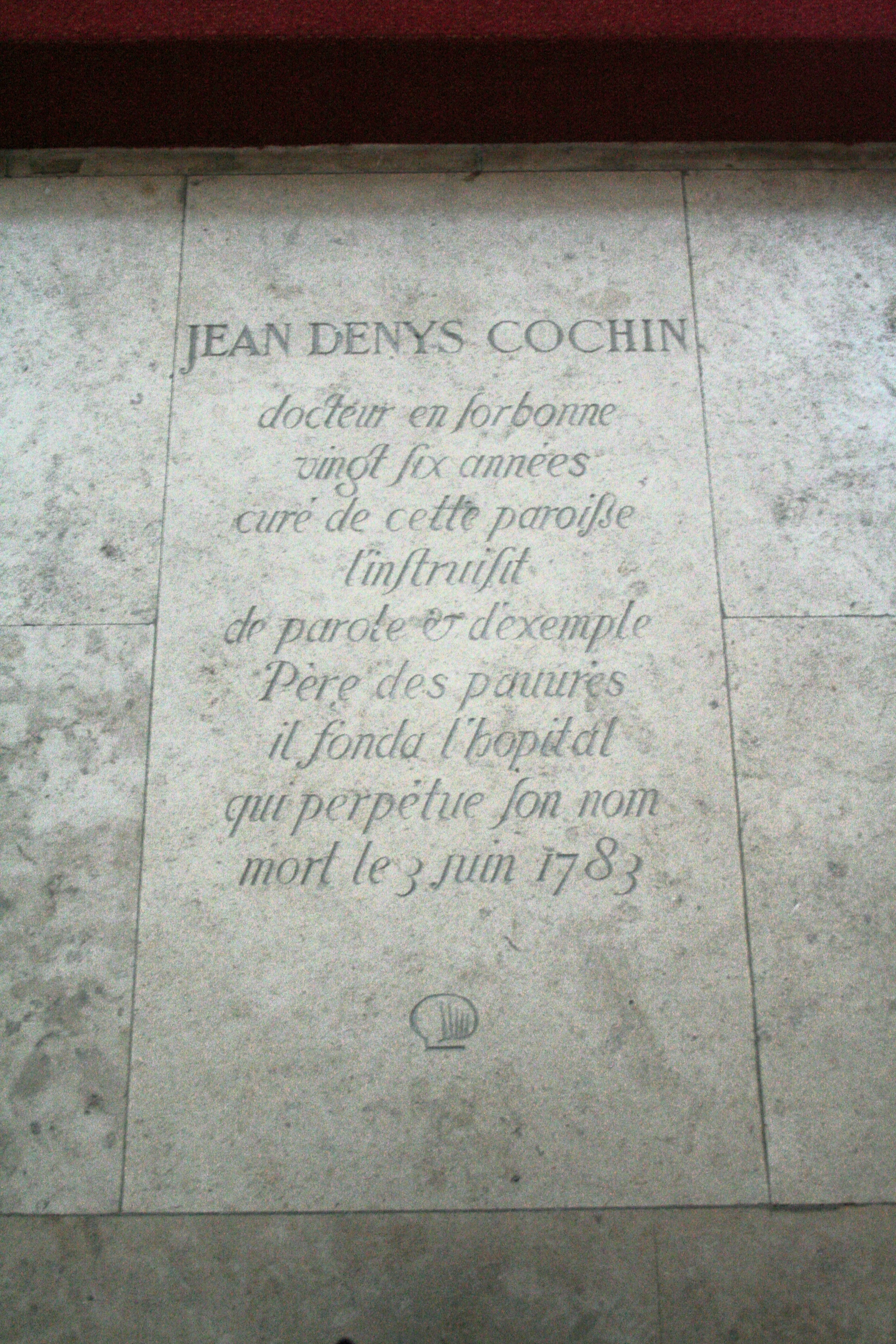 pierre tombale de Jean-Denis Cochin dans l'église Saint-Jacques-du-Haut-Pas, à Paris